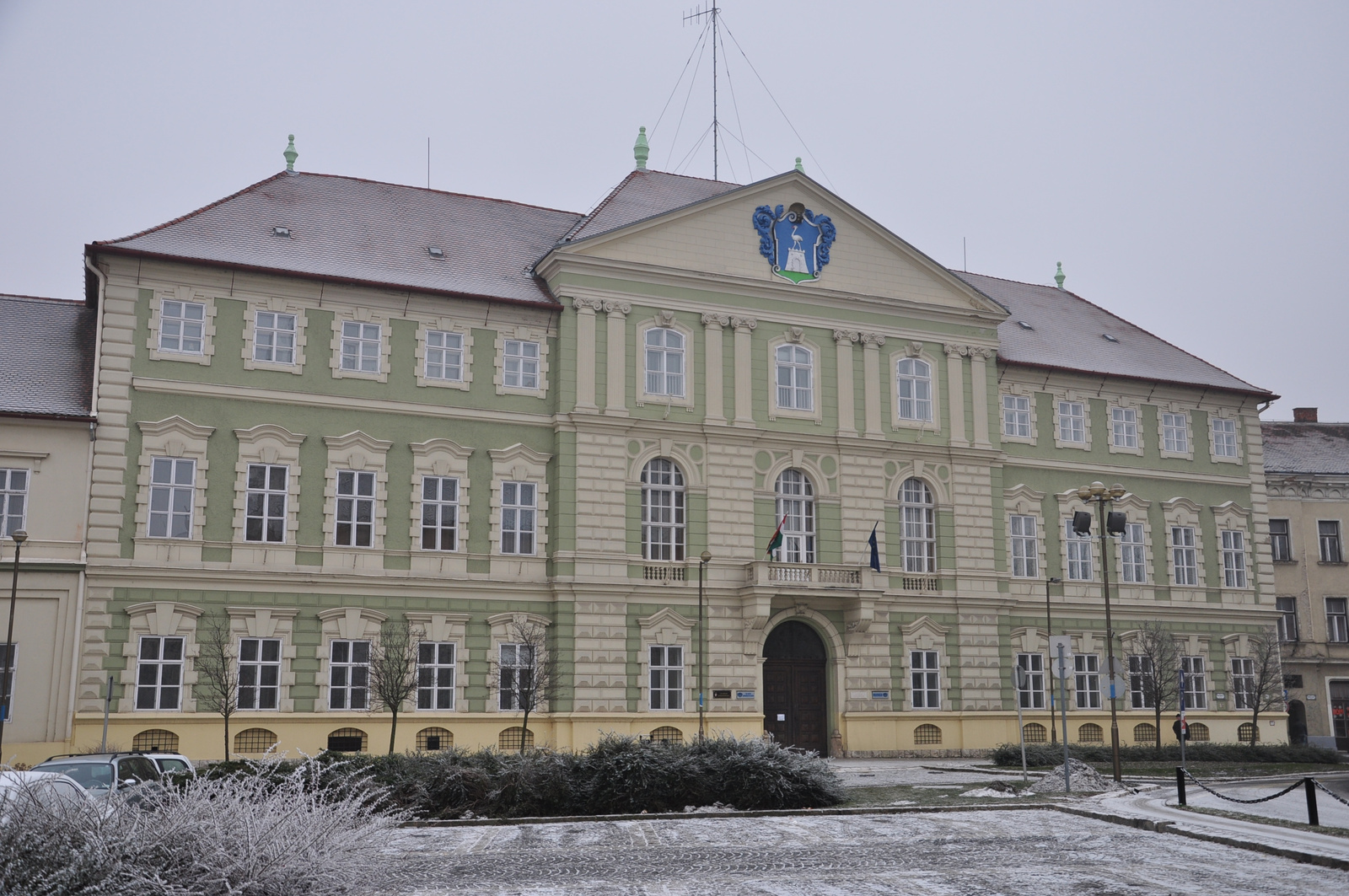 Megyi tanácsház (Szombathely, Berzsenyi Dániel tér 1.)